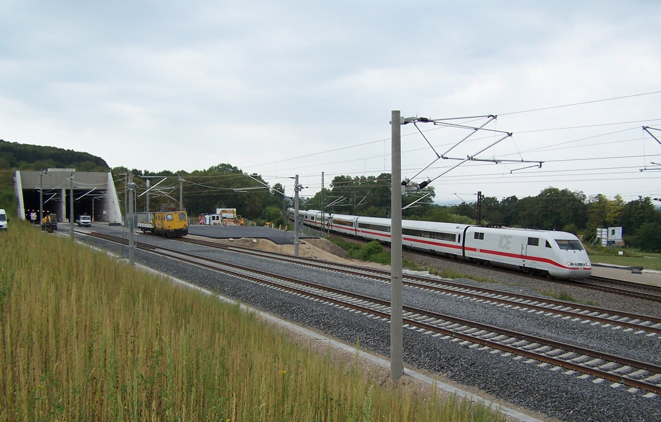 Blick auf das Nordportal des Katzenbergtunnels kurz vor der Fertigstellung.